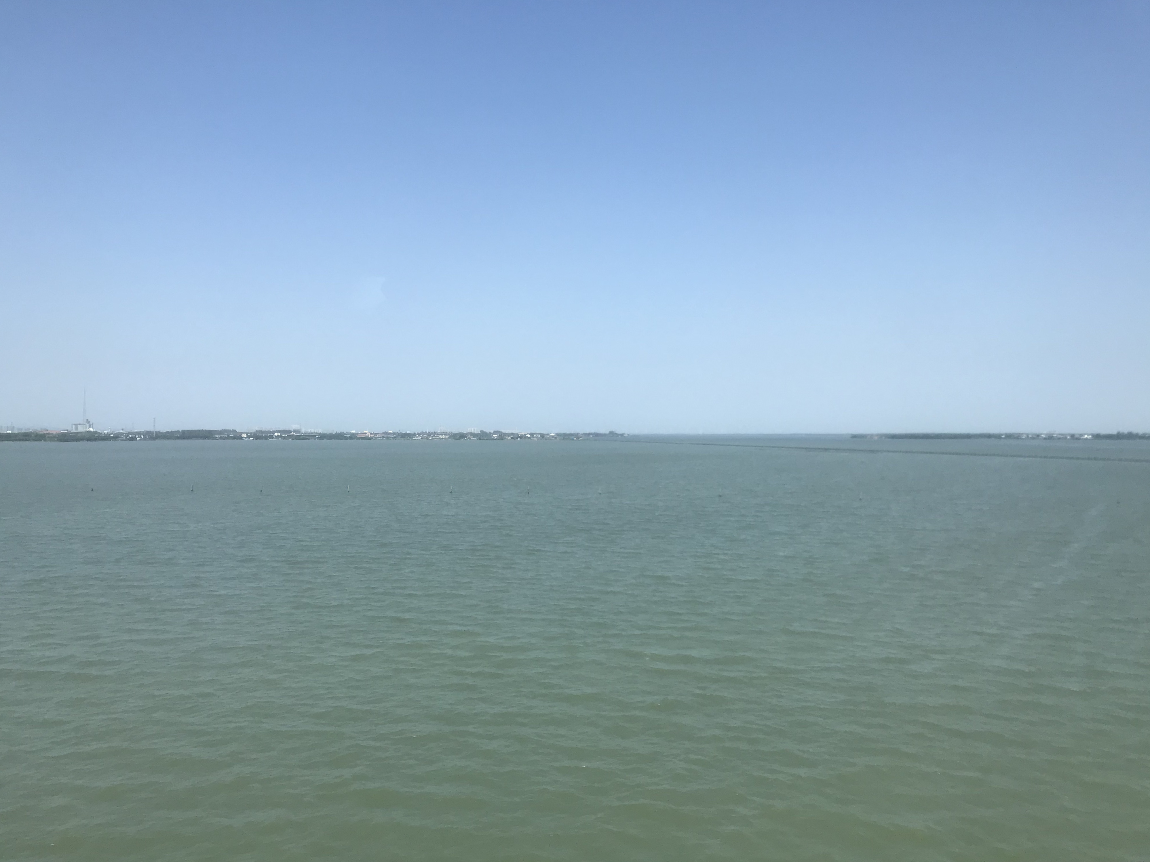 滬寧都市間鉄道の列車内より望む陽澄西湖